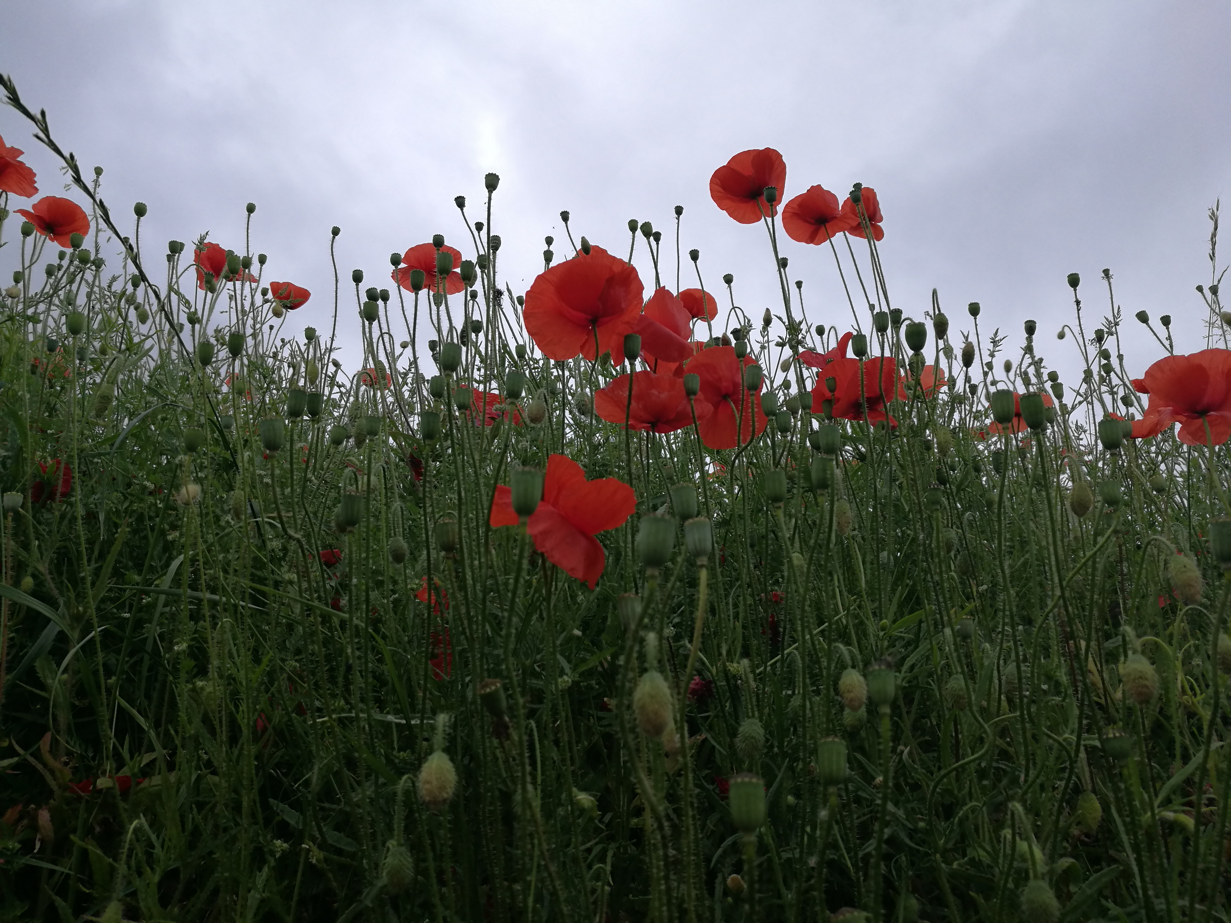 Poppies tussen de loopgraven, Dodengang, Ijzerdijk 62 8600 Diksmuide This photo of immovable heritage has been taken in the Flemish Region